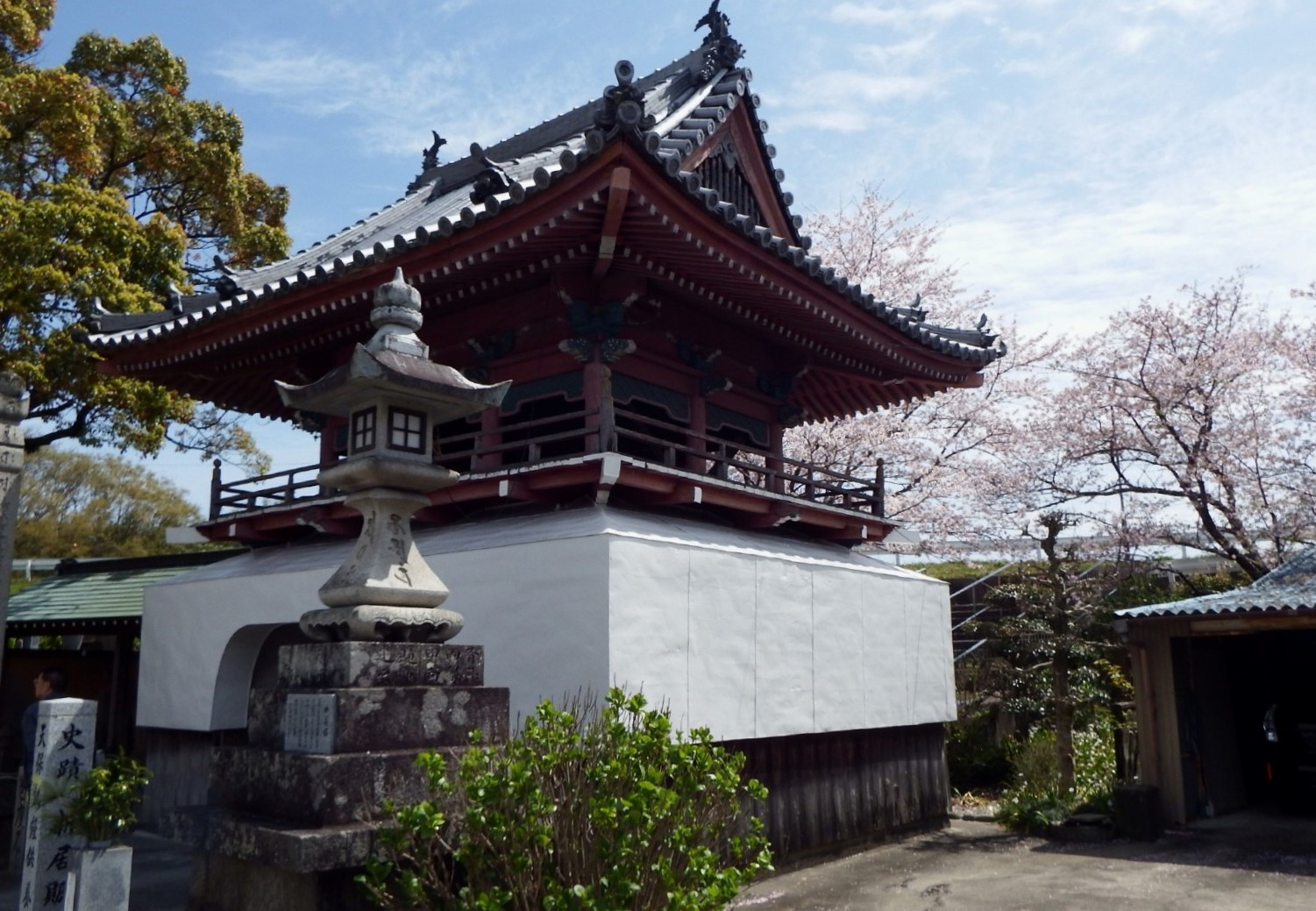 密厳寺 (徳島市)の鐘楼門